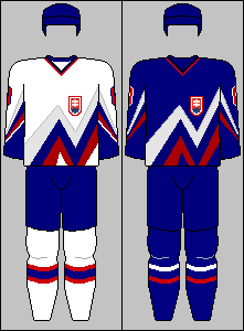 Slovak national team jerseys from World Championship 1996-1997 and World Cup of Hockey 1996